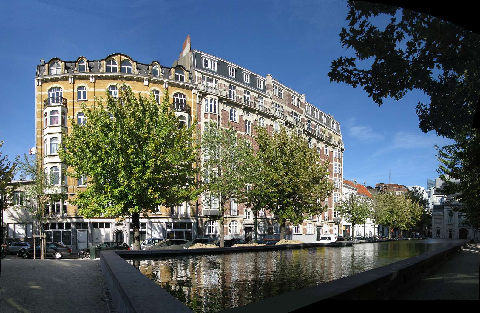 Bruxelles, Quai au Foin vers le théâtre flamand